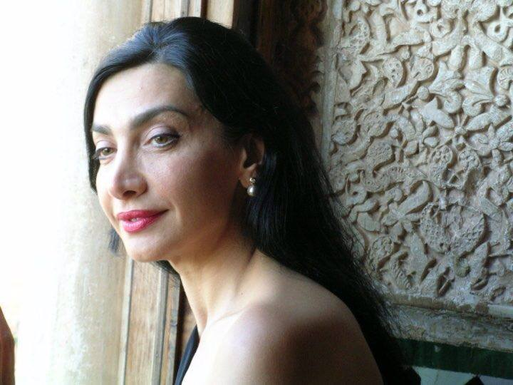 Foto Maram al-Masri